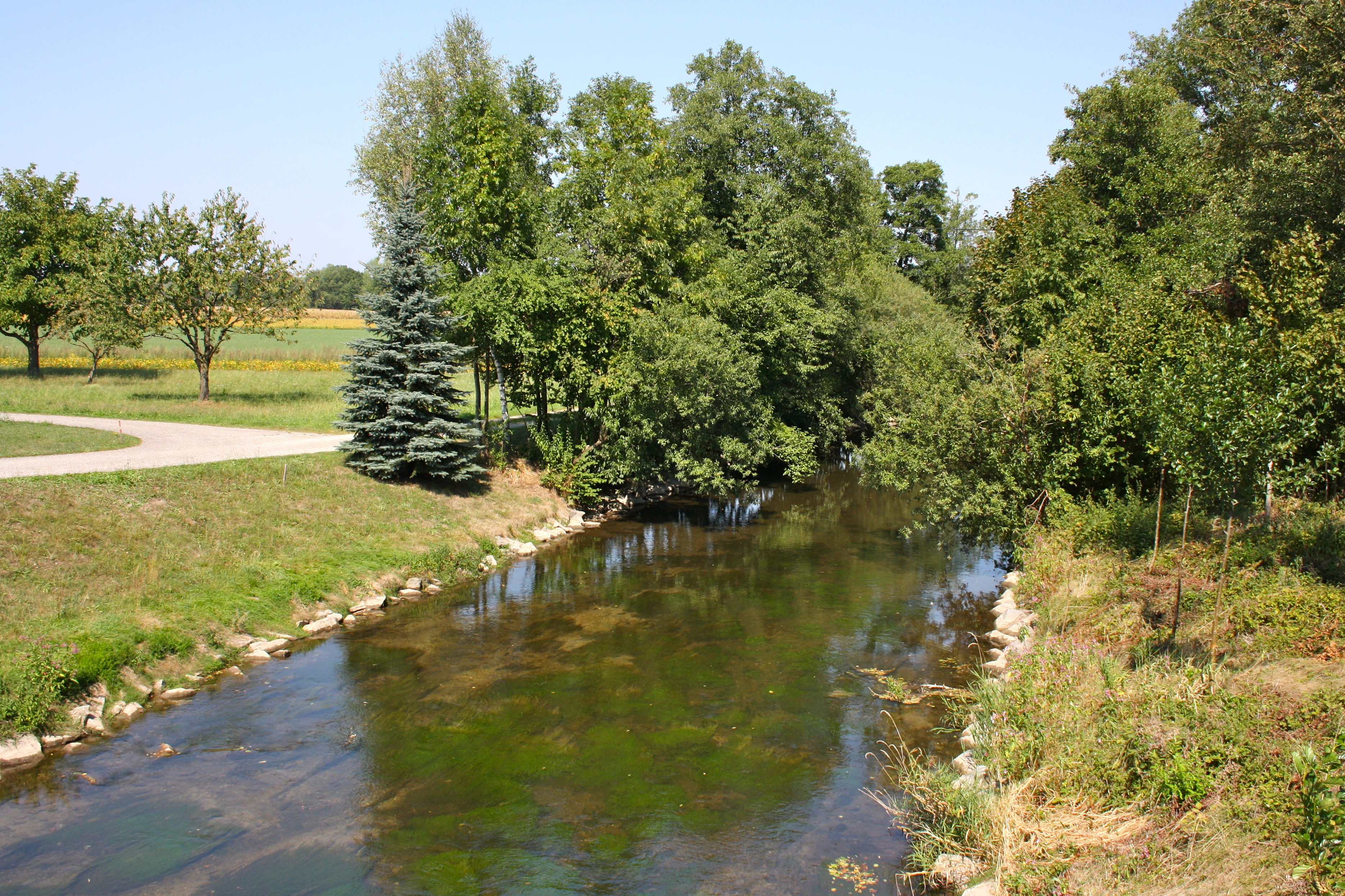 Die Mattig in Biburg.